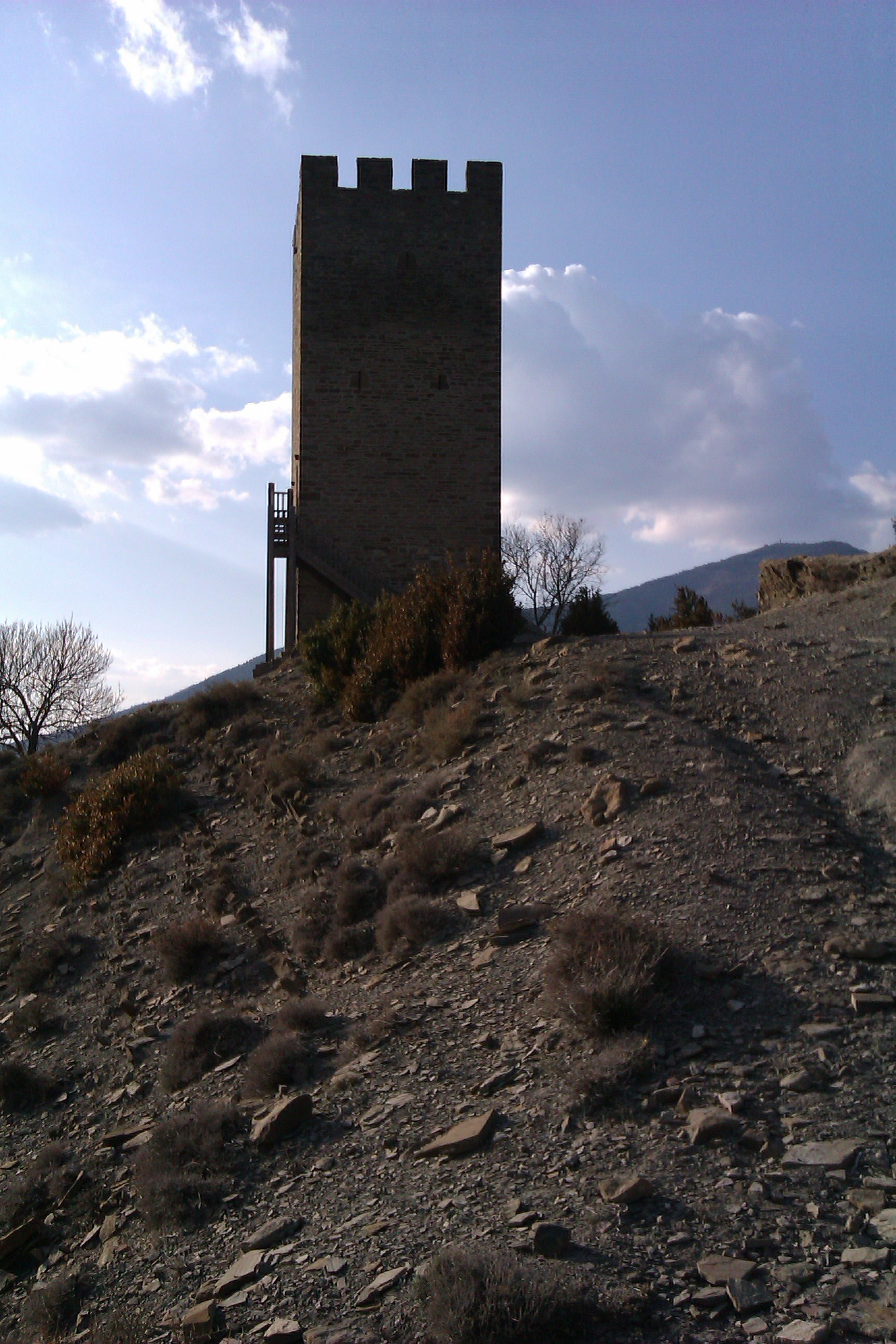 Aragonés: Torraza de Larrede